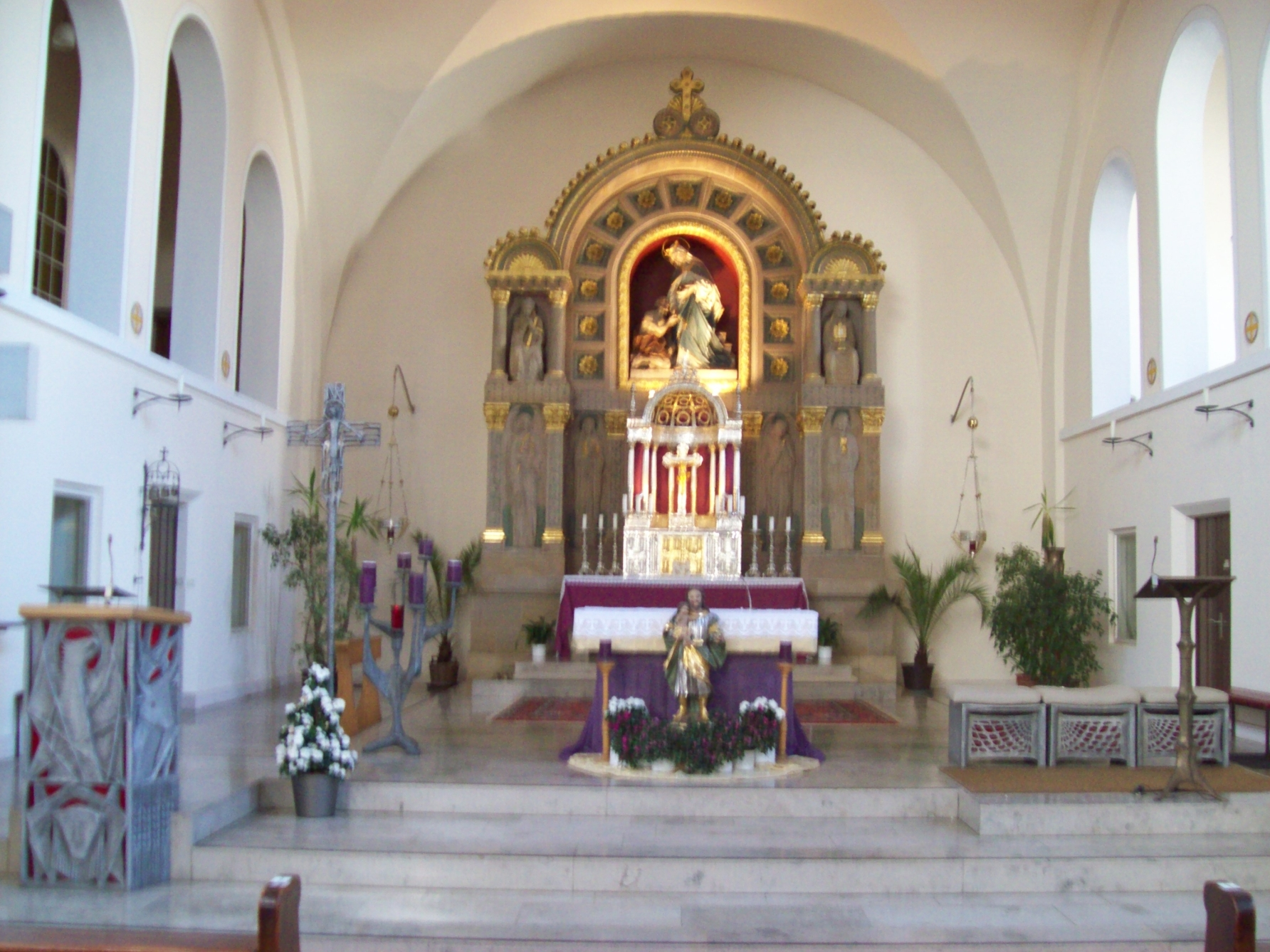 Kapuzinerkirche Aschaffenburg Chor 1975 nach der Umgestaltung durch Hermann Kröckel